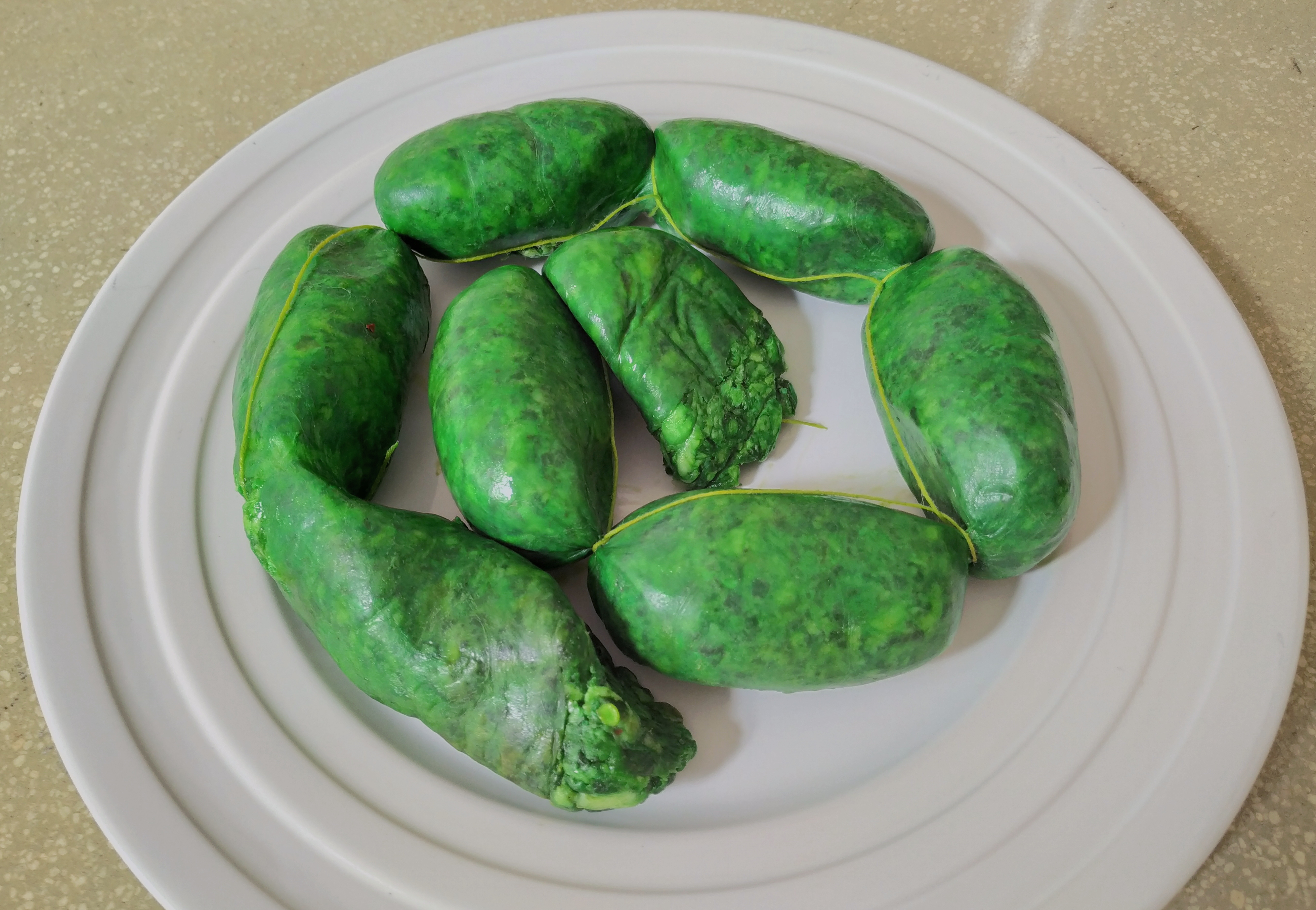 Chorizo verde, típico de Toluca de Lerdo (México). Comprado: 2019-11-17. Foto tomada el: 2019-11-19